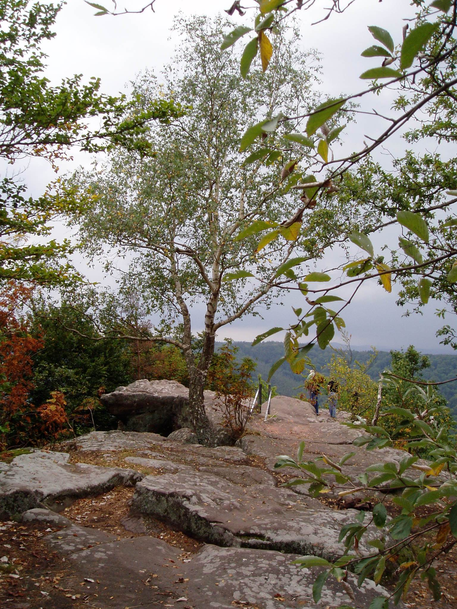 Wanderpfad auf dem Drachenfels